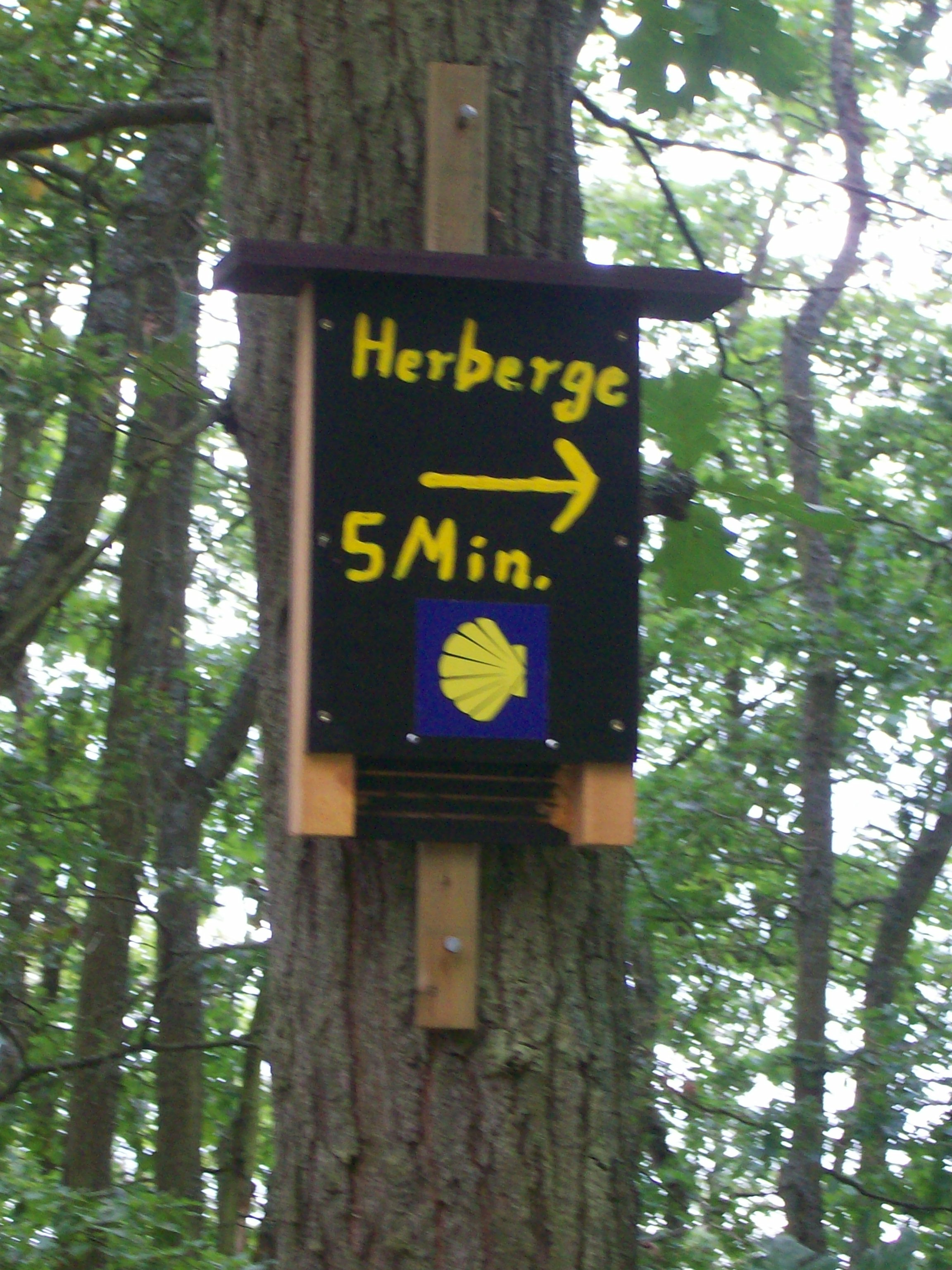 Fledermauskasten vor dem Klickerterhof